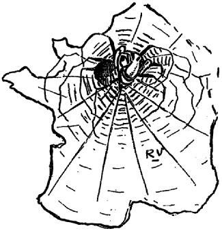 "Le règne d'Israël". Gravure antisémite d'après un dessin de Raphaël Viau.